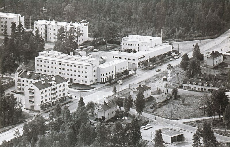 Ilmakuva Vaajakosken keskustasta vuonna 1963